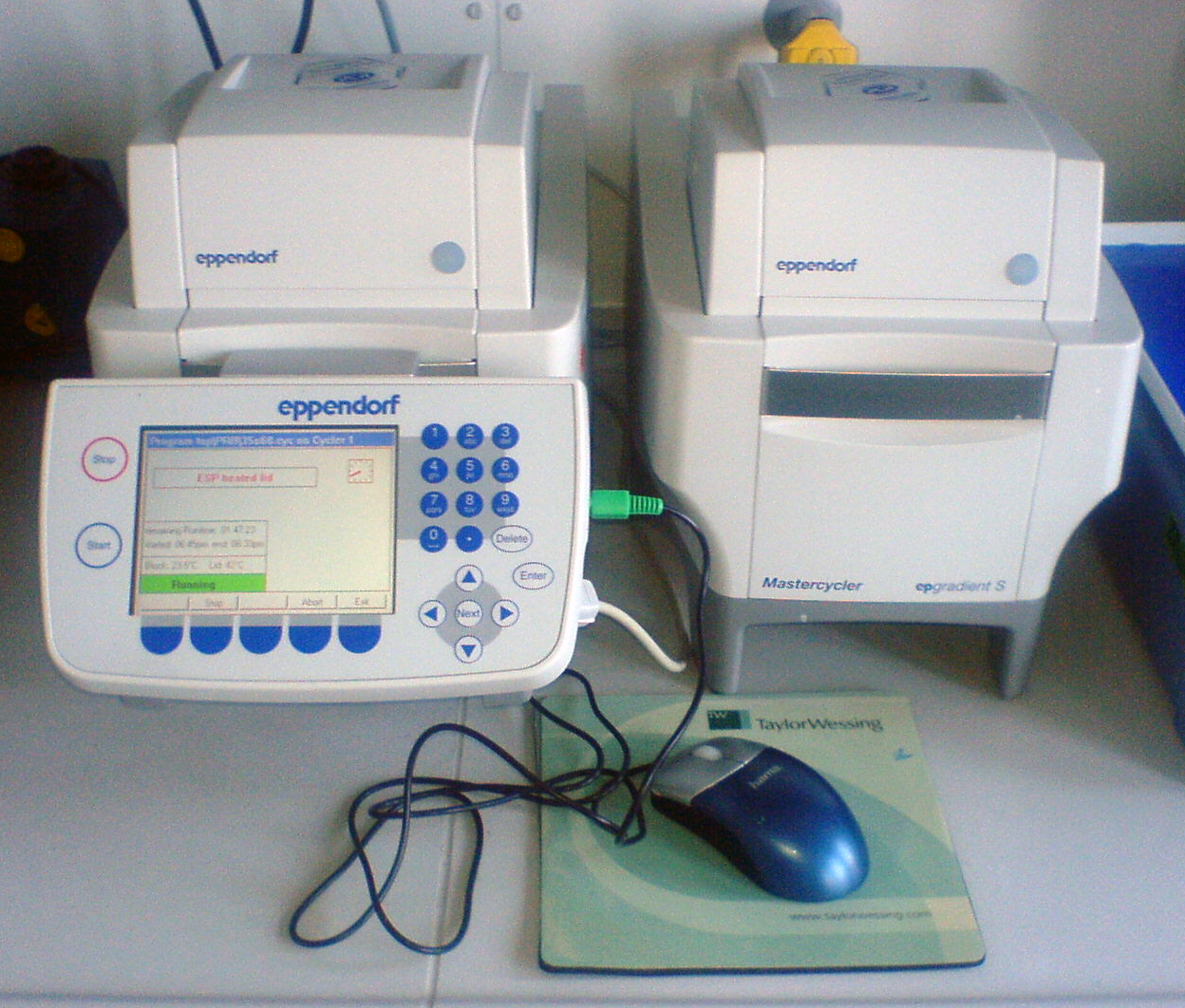 zwei Thermocycler für PCR mit zugehörigem Bedienelement